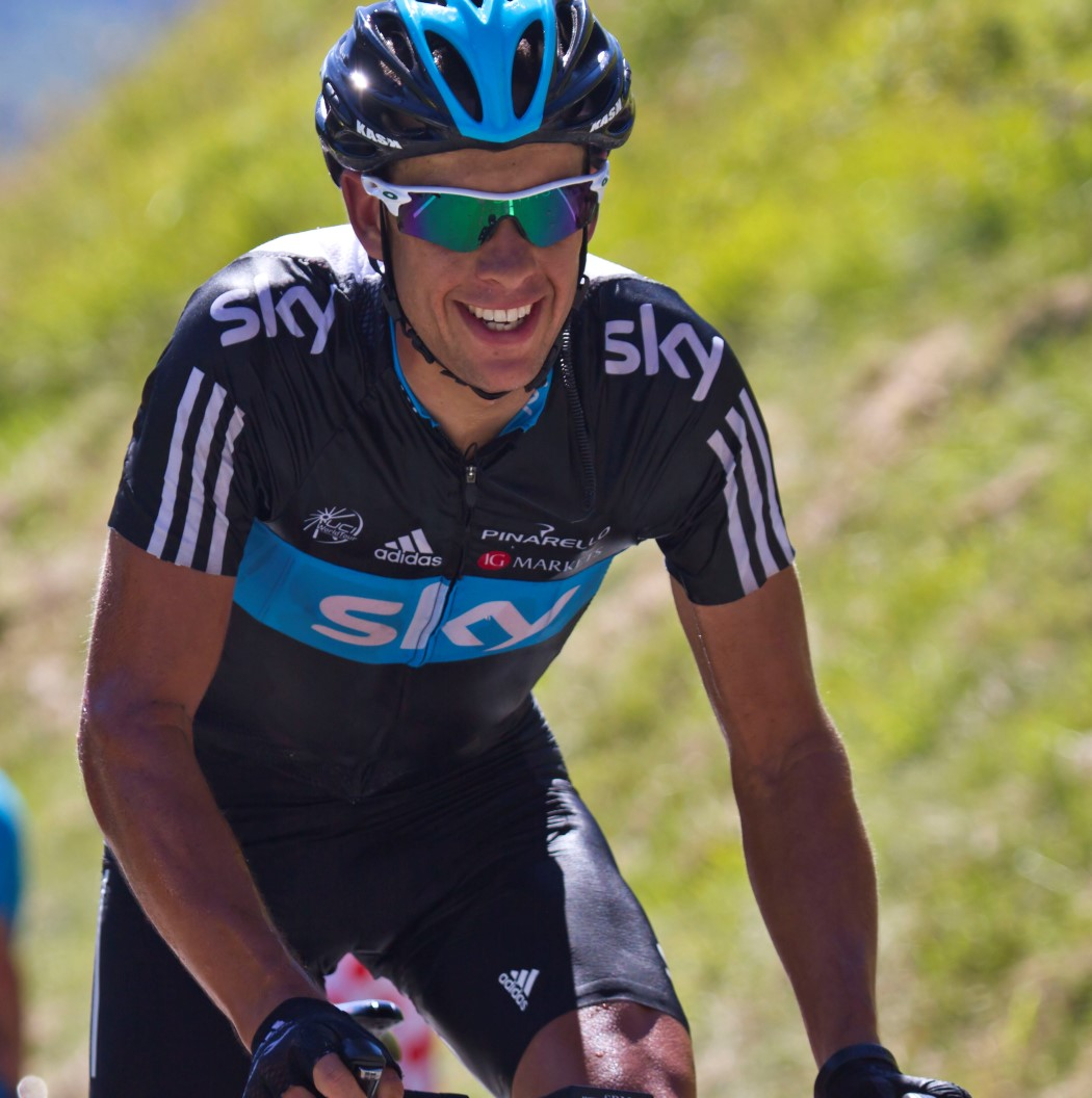 077 richie porte